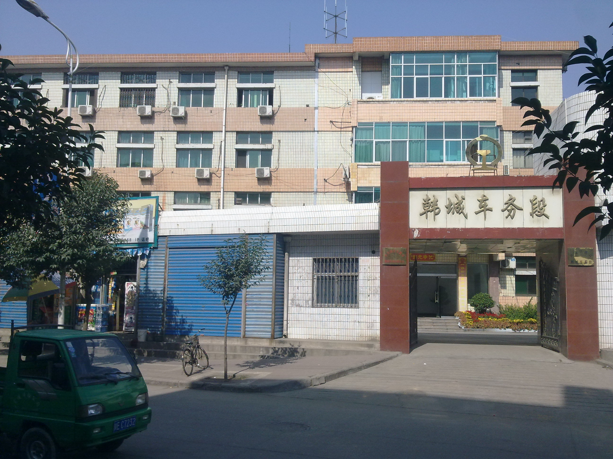 韩城车务段